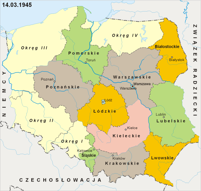 Podział administracyjny Polski w dniu 14 marca 1945Administrative division of Poland as of March 14, 1945